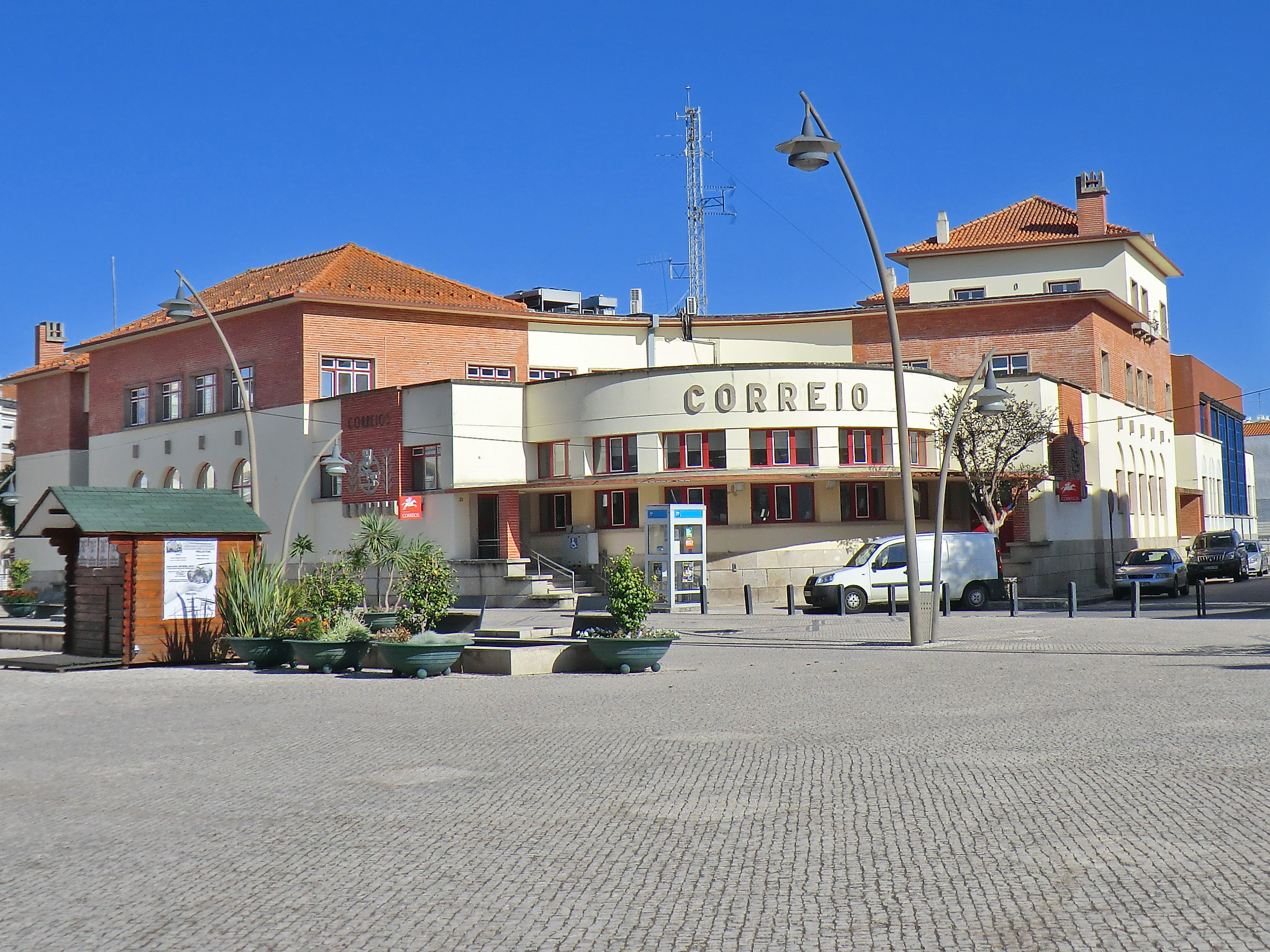 Edifício dos Correios This file was uploaded for Wiki Loves Monuments in Portugal with the unique identifier 97022136.